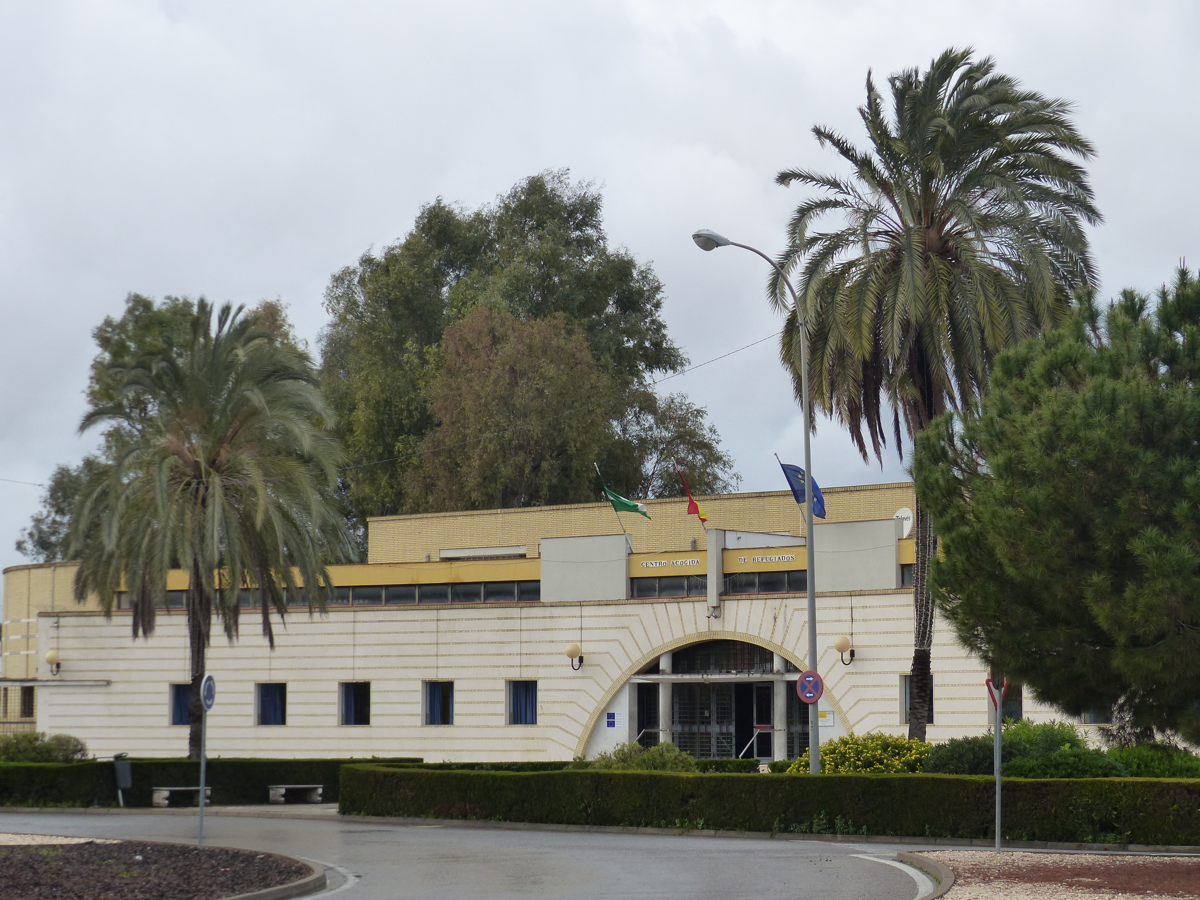 Centro de Refugiados en Sevilla Este